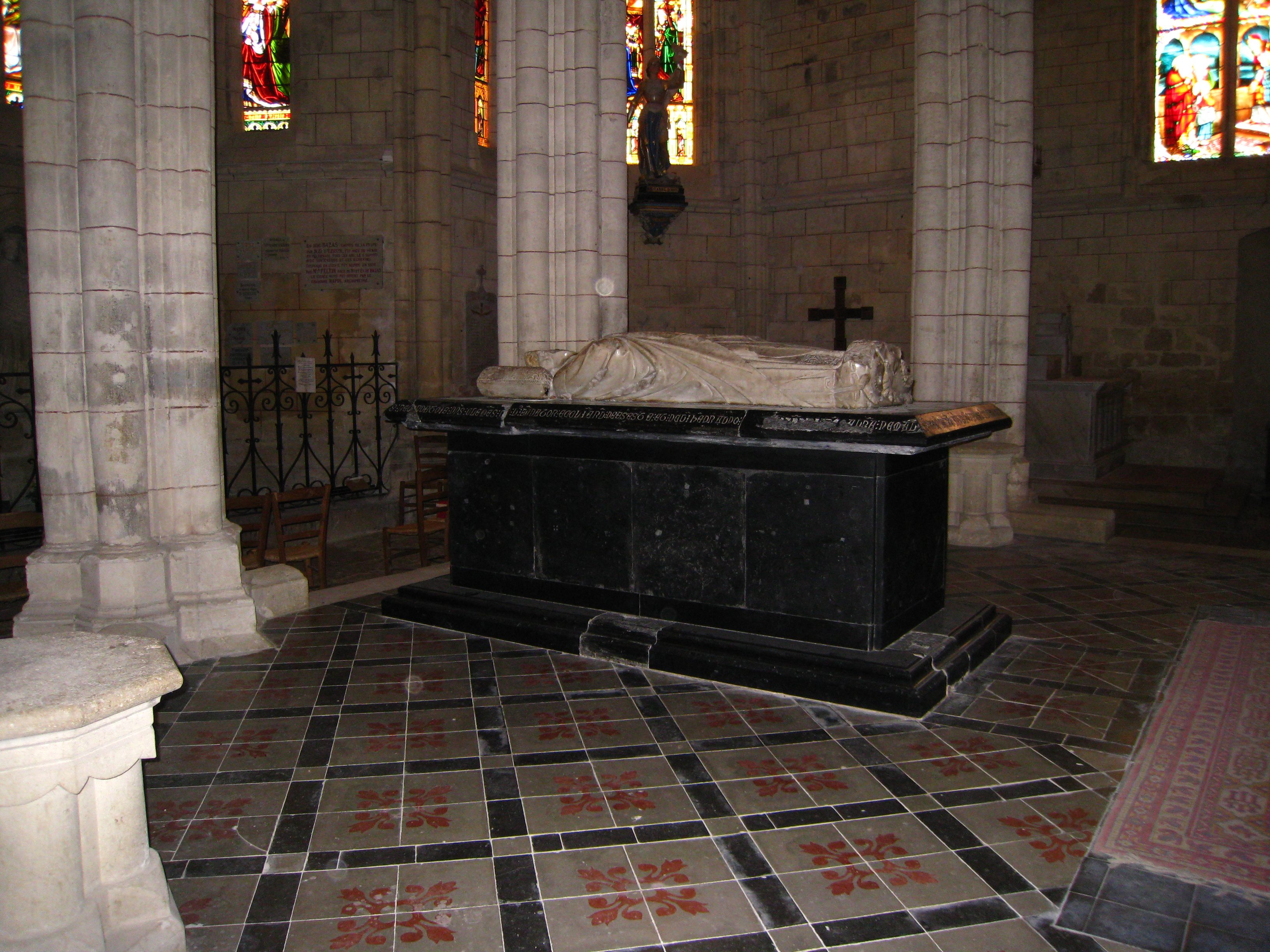 Tombeau de Clément V dans la collégiale d'Uzeste en Gironde